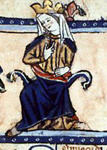 Violanta Aragonská